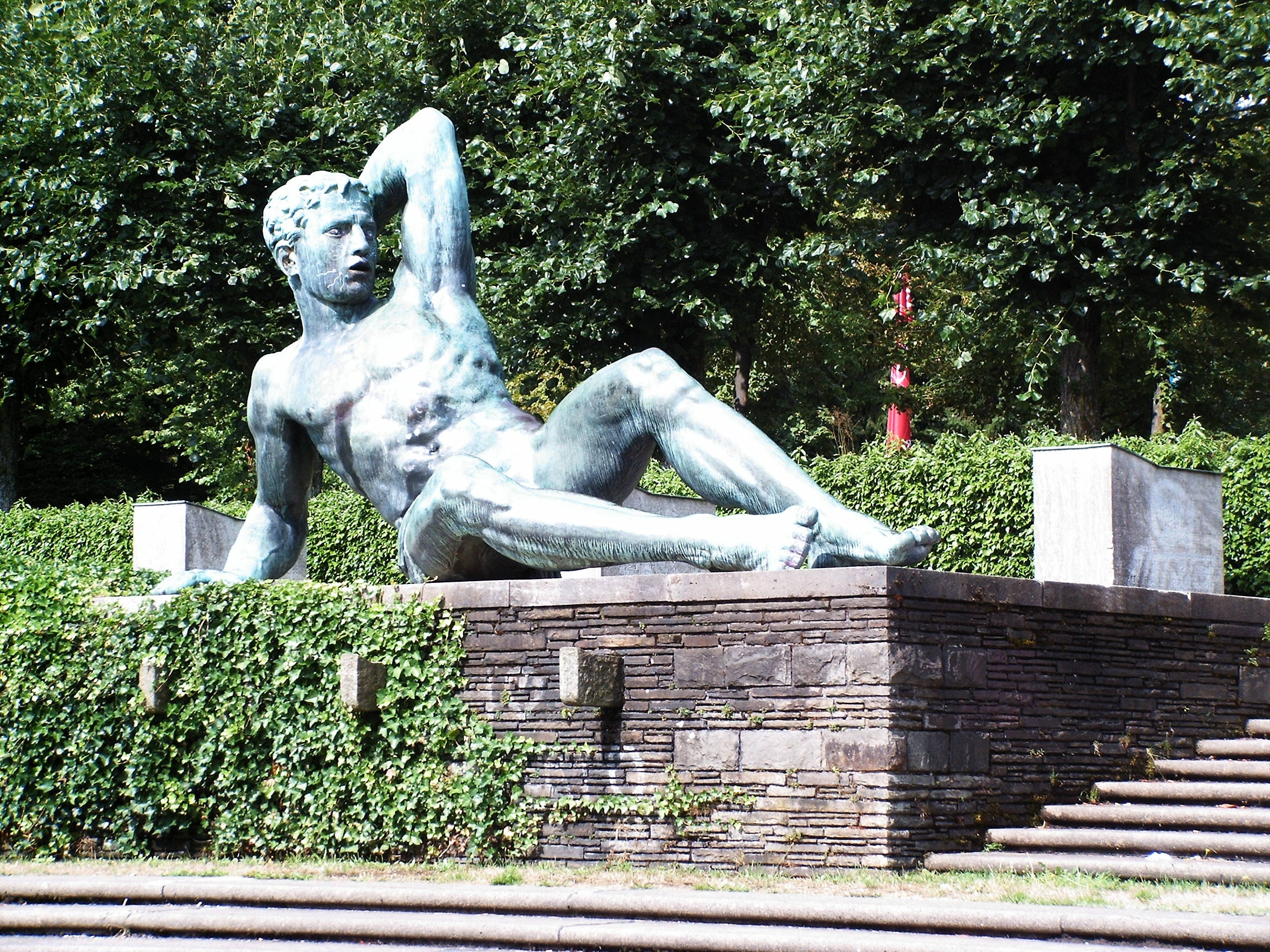 Ehrenmal in Lüdenscheid. Erwachender 1935, nach einem Modell von Willy Meller